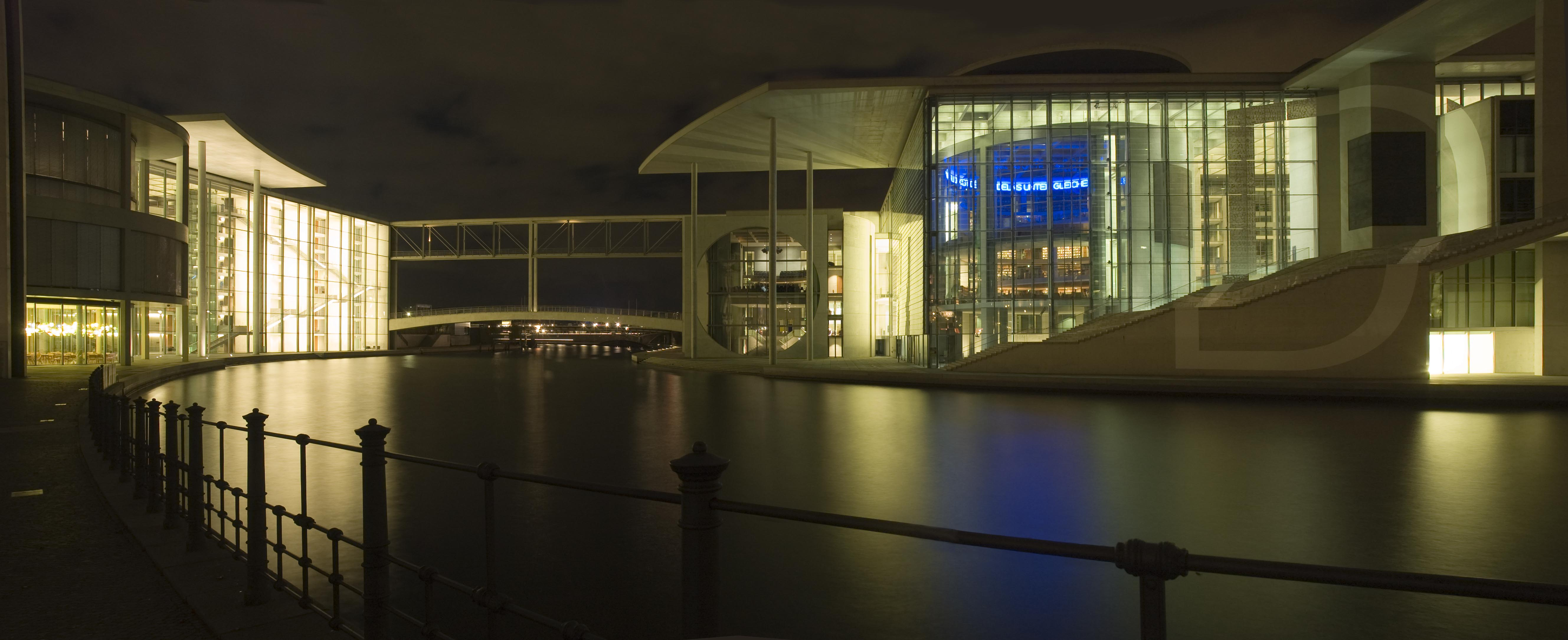 Spreebogen Panorama @ Night.